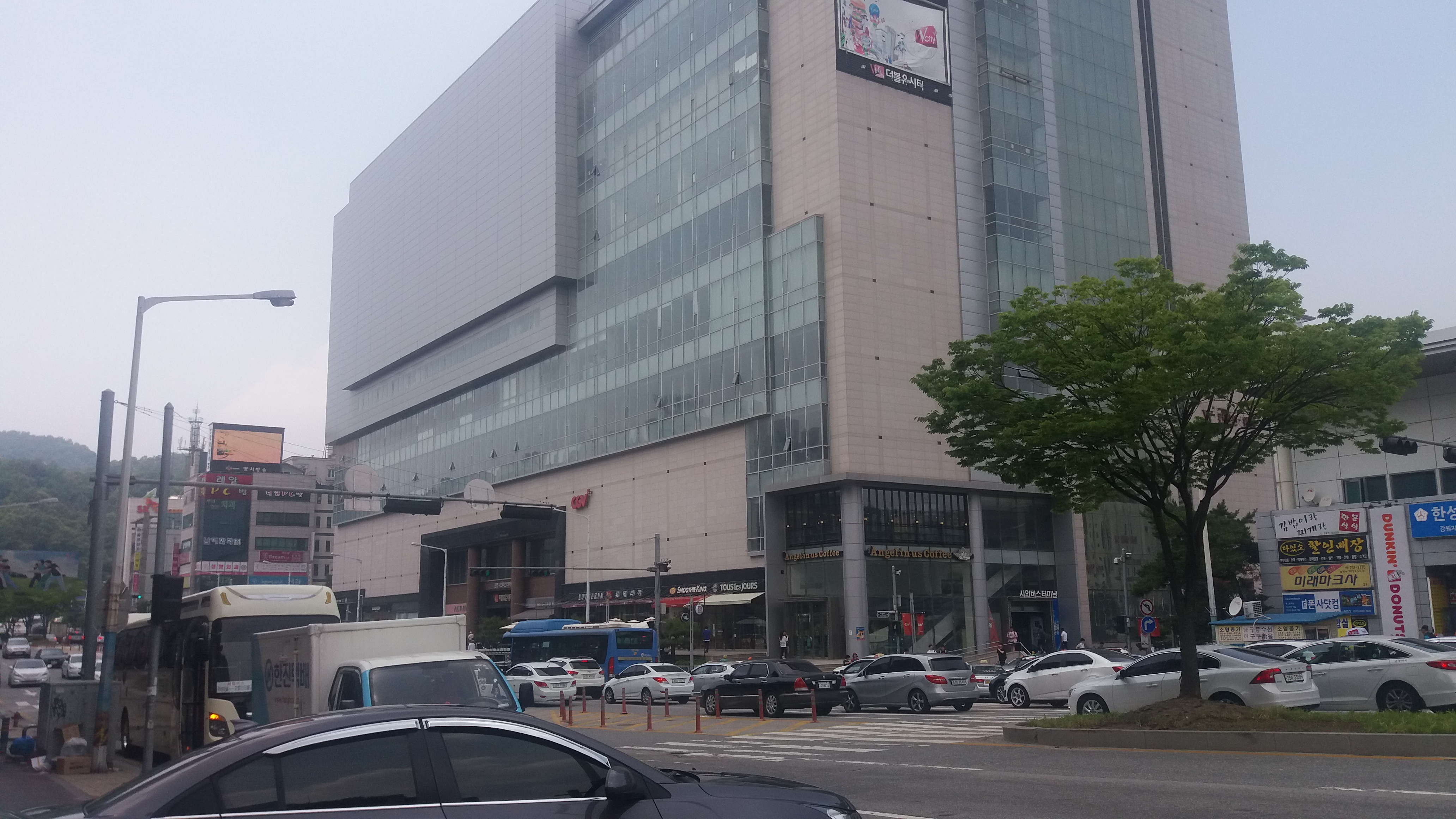 원주시외버스터미널